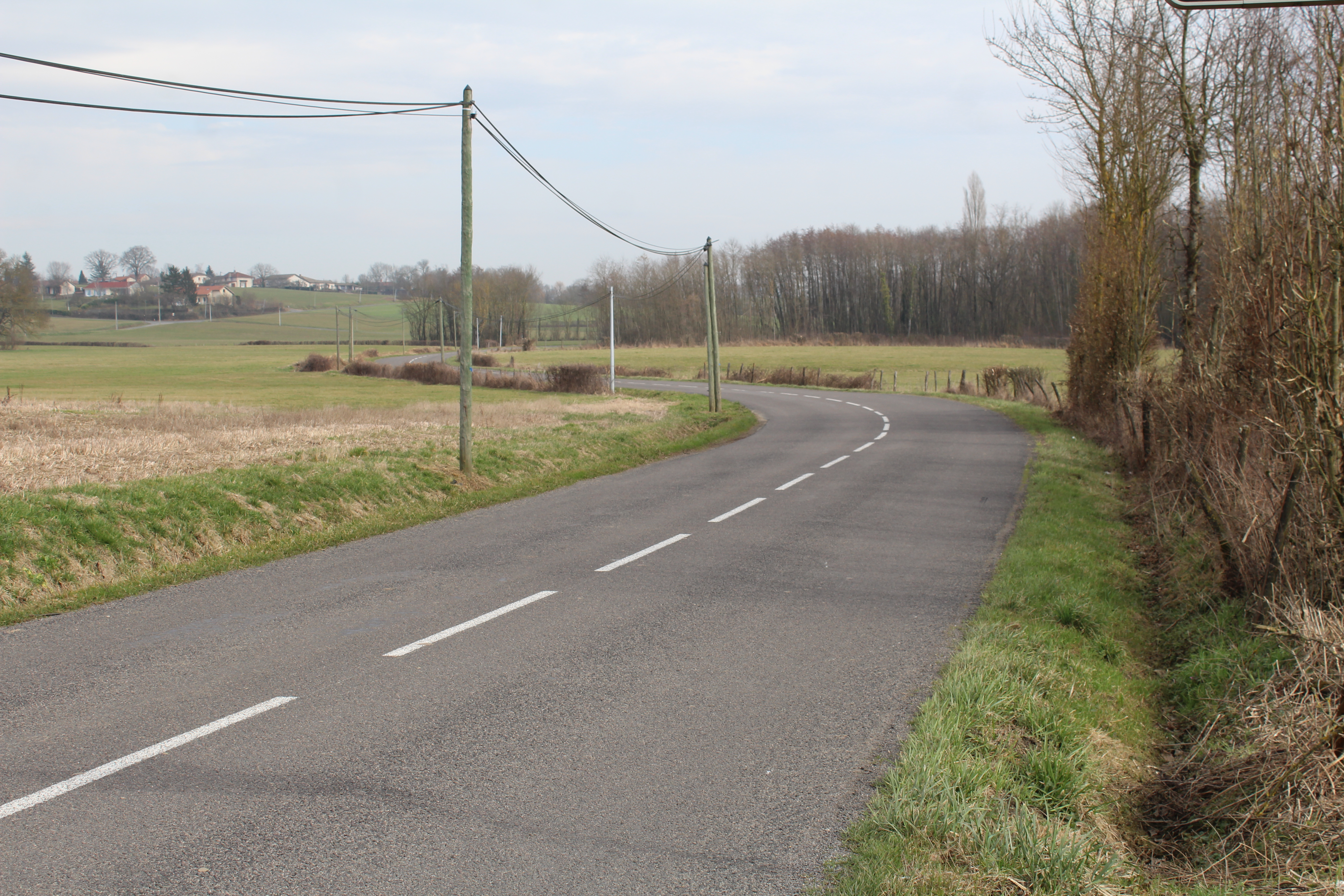 Route D51b à la sortie de Saint-Jean-sur-Veyle en direction de Vonnas.